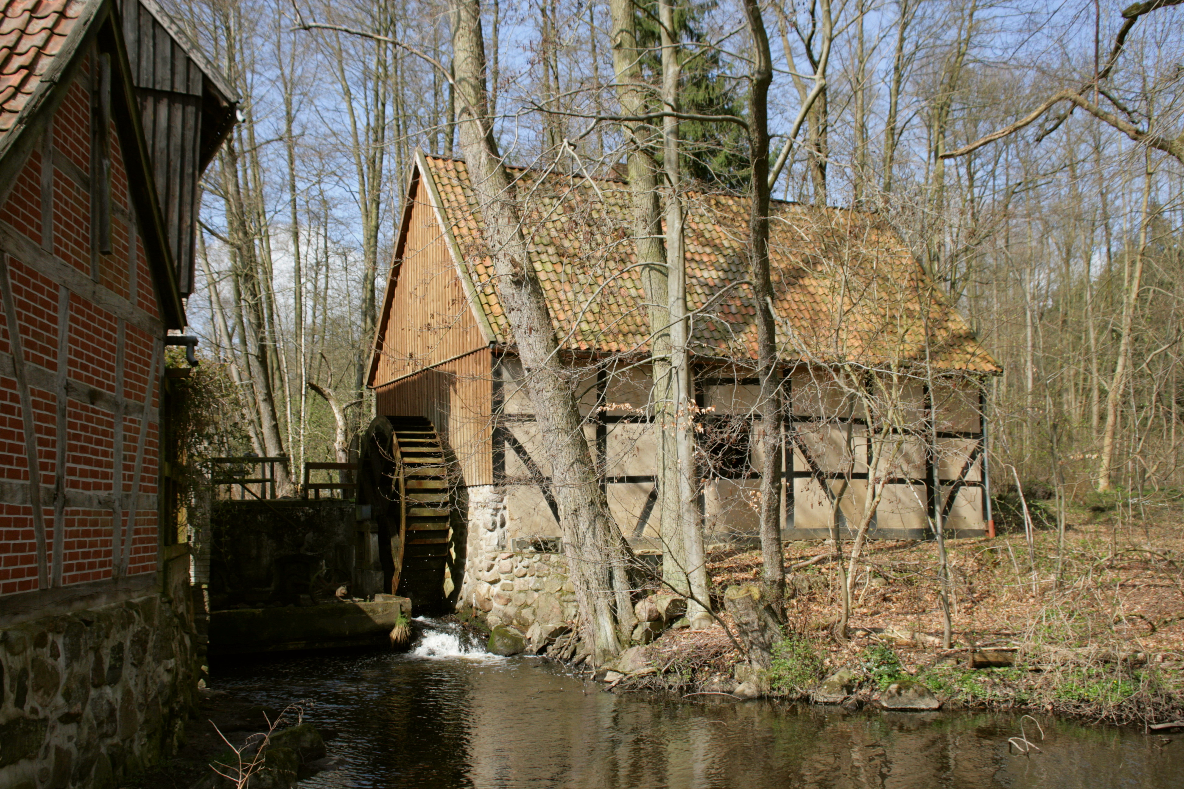 Wassermühle Jiggel am Schnegaer Mühlenbach in Jiggel, Bergen an der Dumme